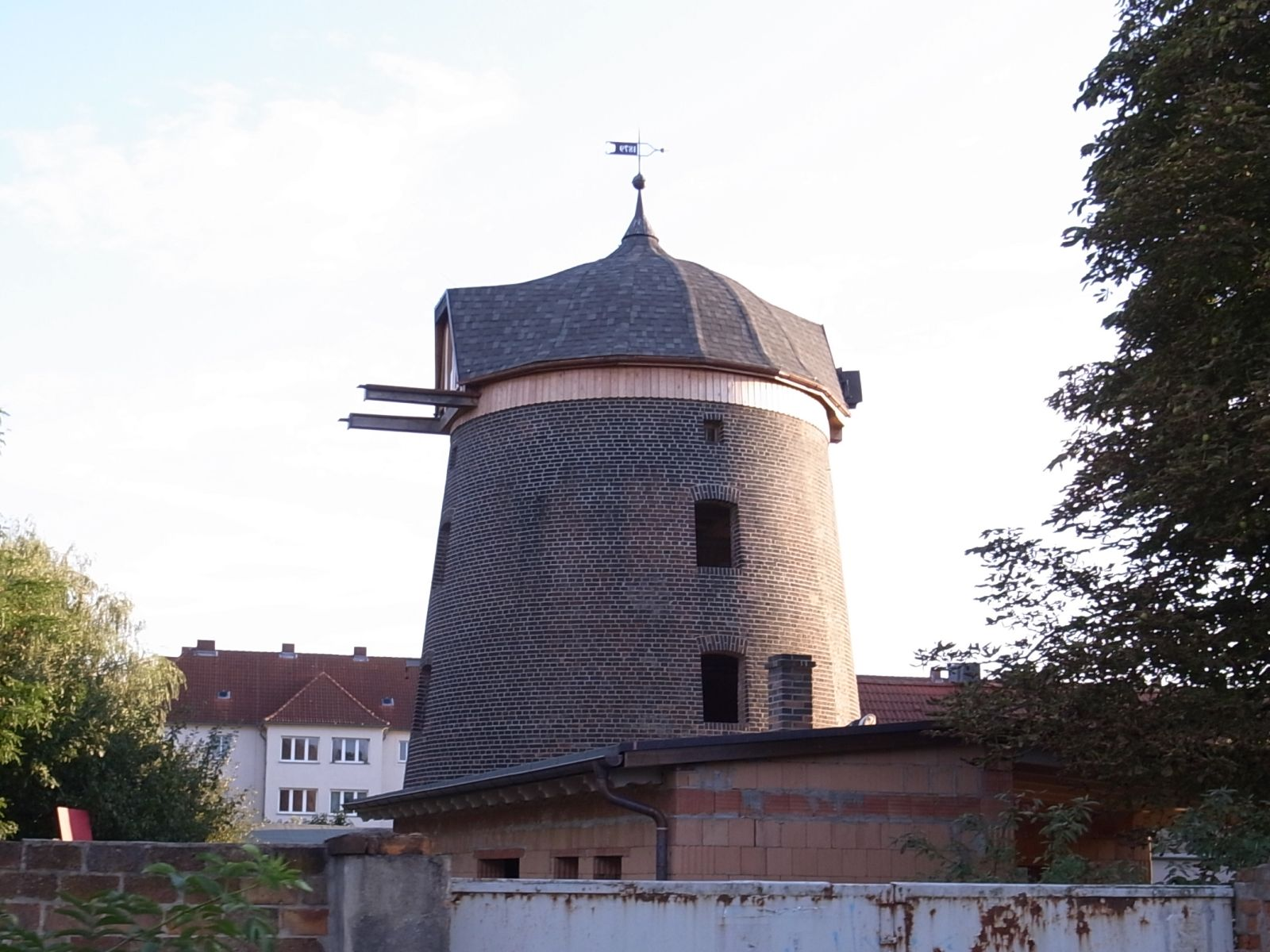 Dessau, Ziebigker Mühle, erbaut um 1870, in den zwanziger Jahren umstellung auf Gasbetrieb und später auf Elektromotor. Betrieb der Mühle in der Mitte der 1980'er Jahre eingestellt. Umgebaut zum Wohnhaus (Quelle: Mitteldeutsche Zeitung 30.Mai 2009)